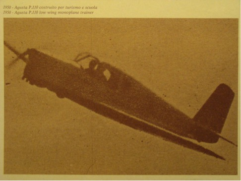 Monoplano Augusta_CP.110_in_volo Licensing Categoria:Immagini di aeroplani